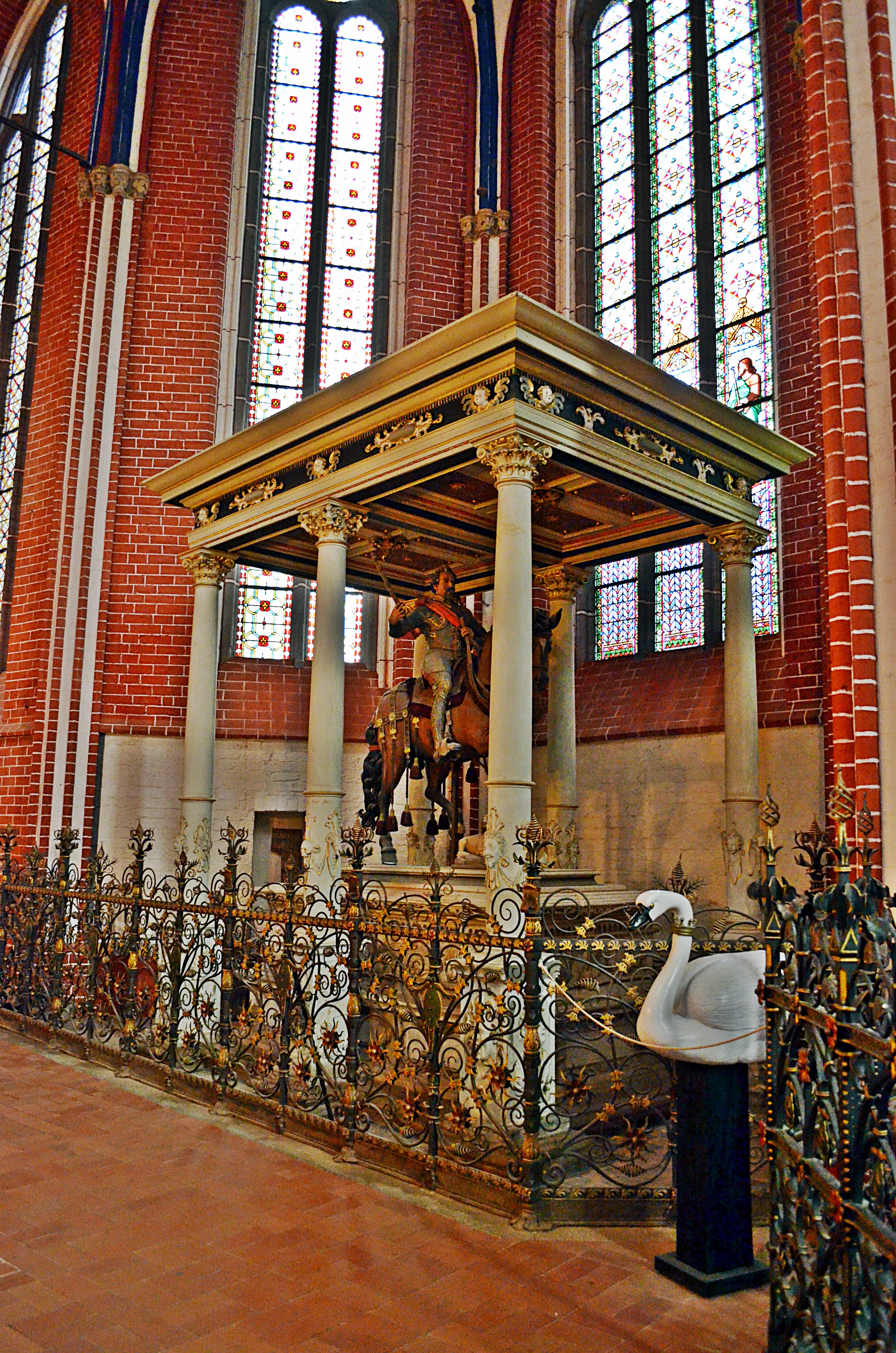 Bad Doberan, Münster, Grabanalage mit Reiterstandbild